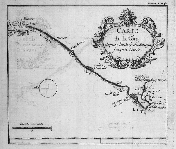 "Carte de la Côte depuis l'entrée du Sénéga jusqu'à Gorée" (Illustration de Nouvelle relation de l'Afrique occidentale, contenant une description exacte du Sénégal et des pays situés entre le Cap-Blanc et la rivière de Serre-Lionne, jusqu'à plus de 300 lieues en avant dans les terres, l'histoire naturelle de ces pays, les différentes nations qui y sont répandues, leurs religions et leurs moeurs, avec l'état ancien et présent des compagnies qui y font le commerce, de Jean-Baptiste Labat)